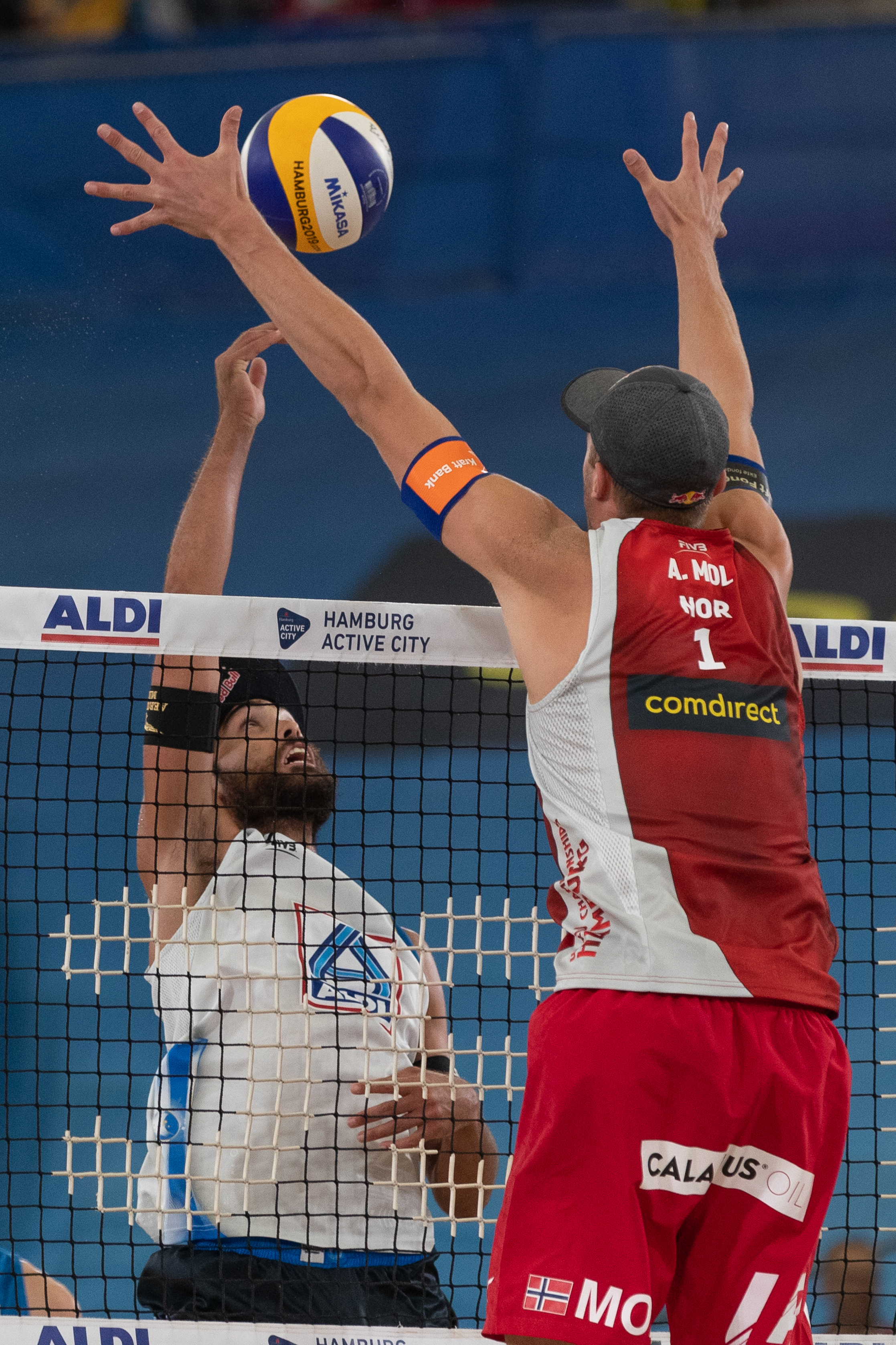 BeachVolleyball Weltmeisterschaft Hamburg 2019; v.li.: Daniele Lupo (ITA, Italien), Anders Berntsen Mol (NOR, Norwegen)